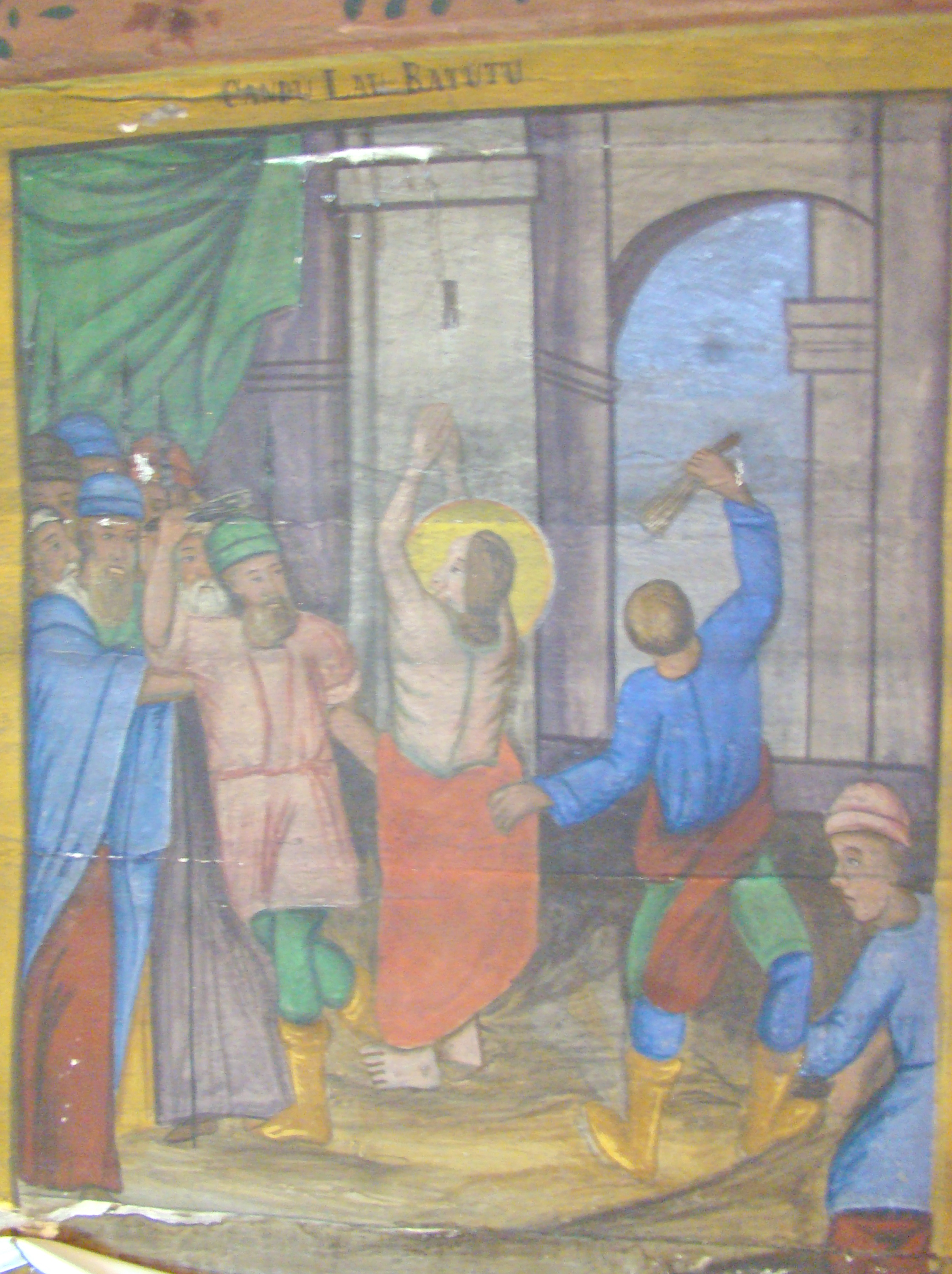 Biserica de lemn „Sfinții Arhangheli Mihail și Gavriil” din Țărmure, județul Arad